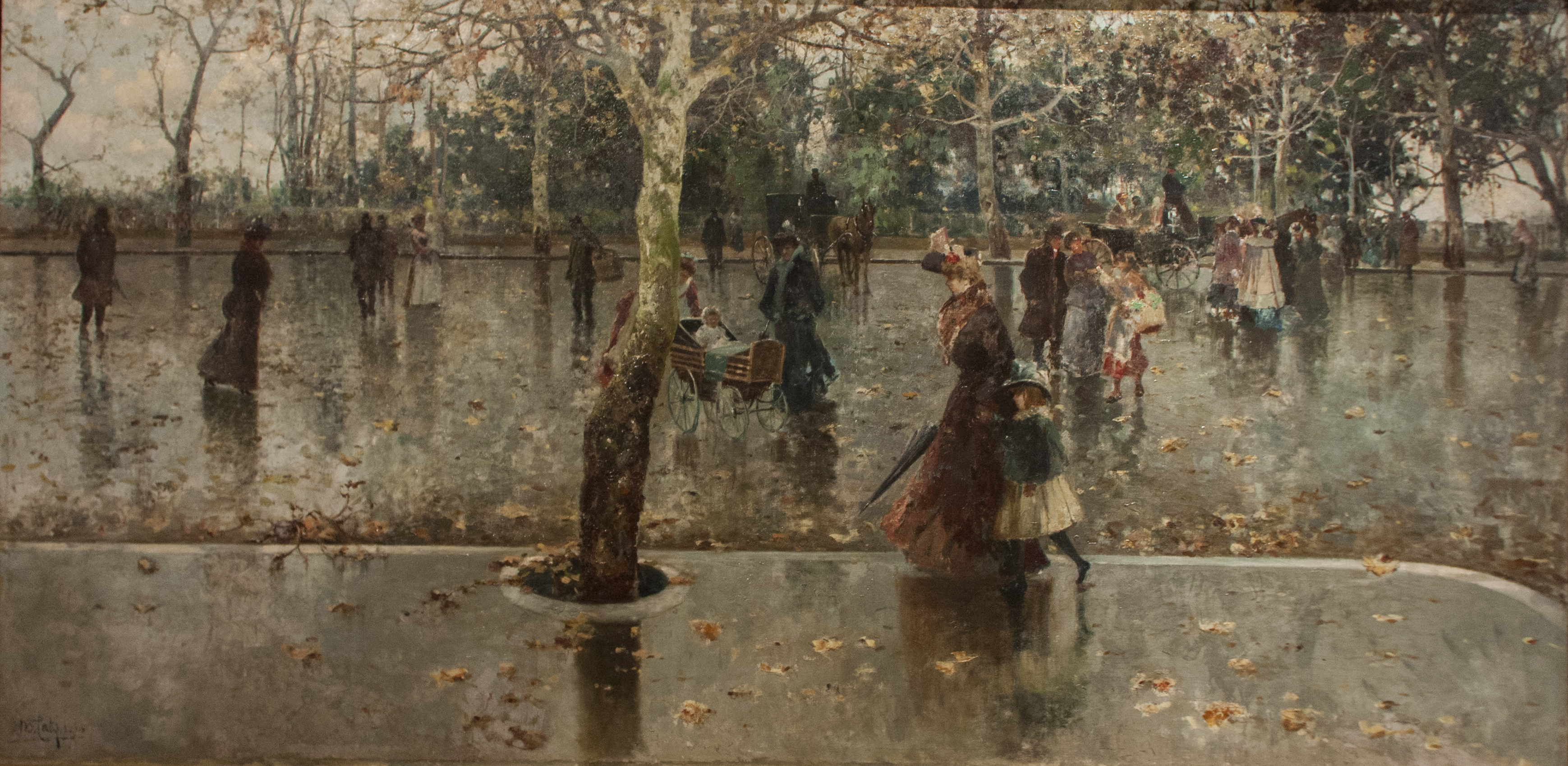 Ultime foglie (Il viale della Libertà in una giornata di pioggia) - Michele Catti olio su tela 1906 Acquisto alla mostra personale dell'artista, 1910